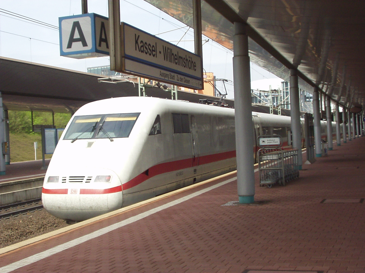 Bahnhof Kassel-Wilhelmshöhe, ICE am Gleis 2